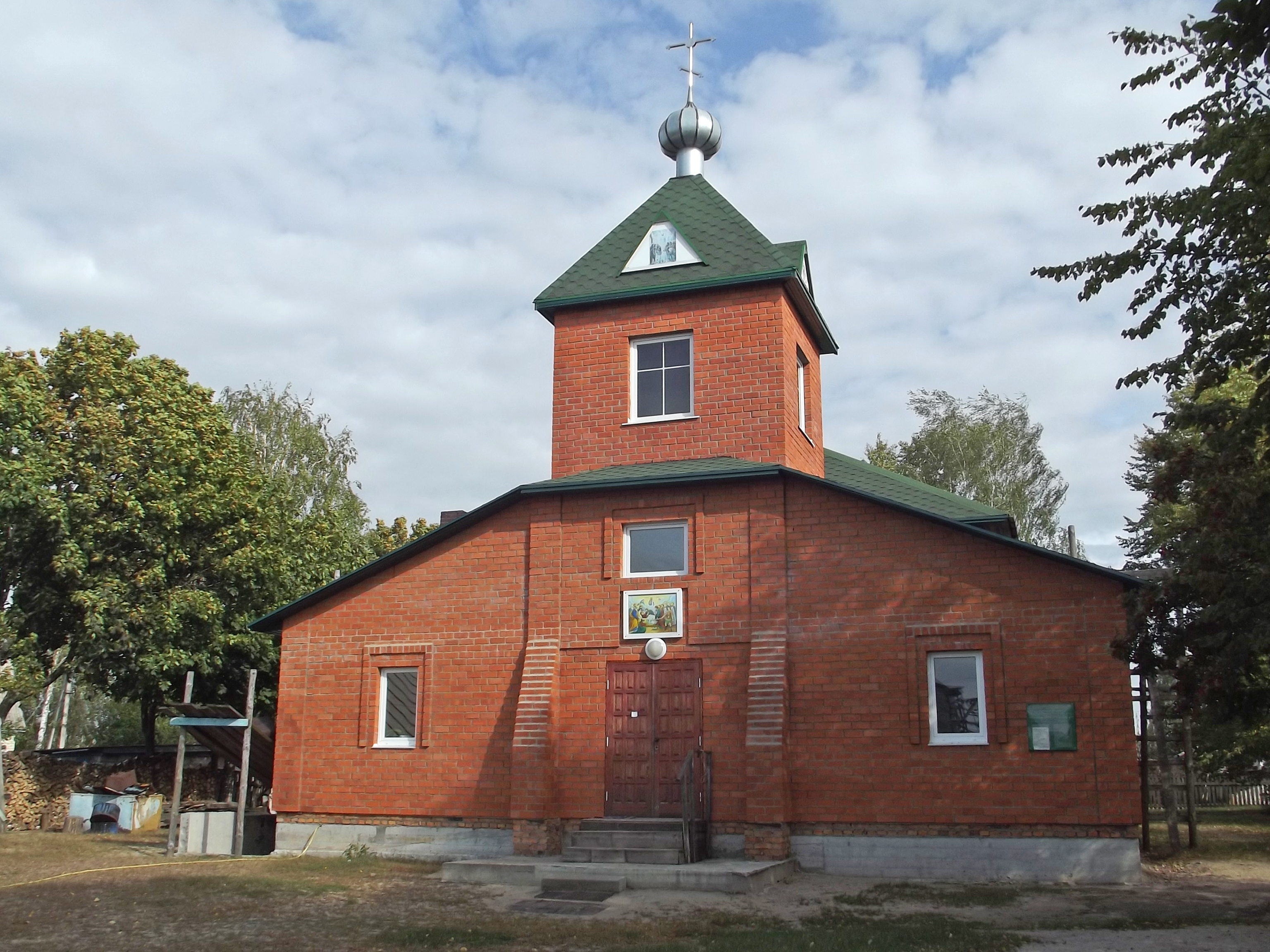 Усренская церковь